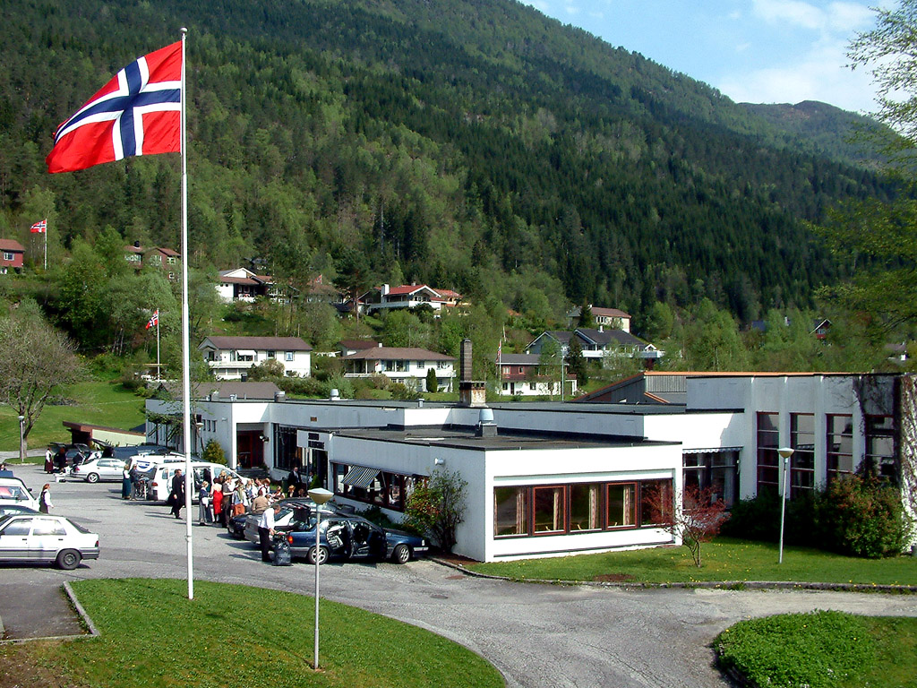 Sunnfjord Folkehøgskule